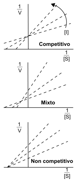 Cinética de diferentes tipos de inhibidores encimáticos